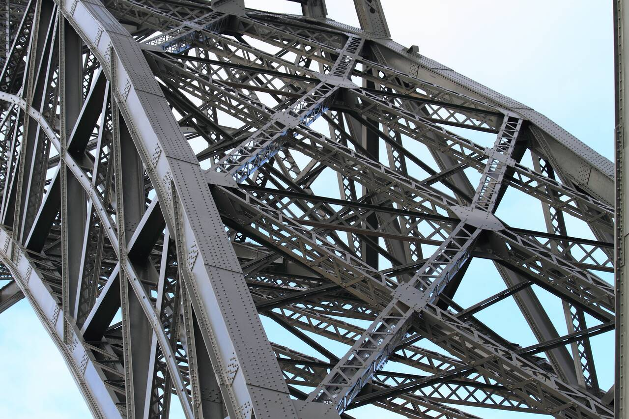 As Rendas da D. Maria